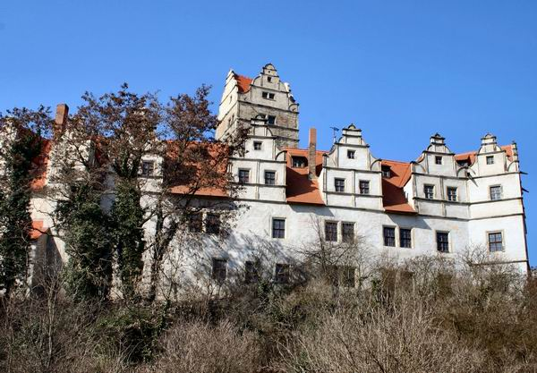 eigenes Foto von 2005, public domain, Schloss Plötzkau